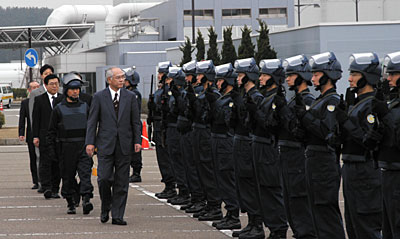 米英によるイラク攻撃に伴うテロ警戒強化措置を踏まえ、東京電力・柏崎刈羽原子力発電所を訪れて、同発電所を警備する、新潟県警機動隊銃器対策部隊からなる「原子力関連施設警戒隊」などを視察する佐藤英彦警察庁長官[1]。